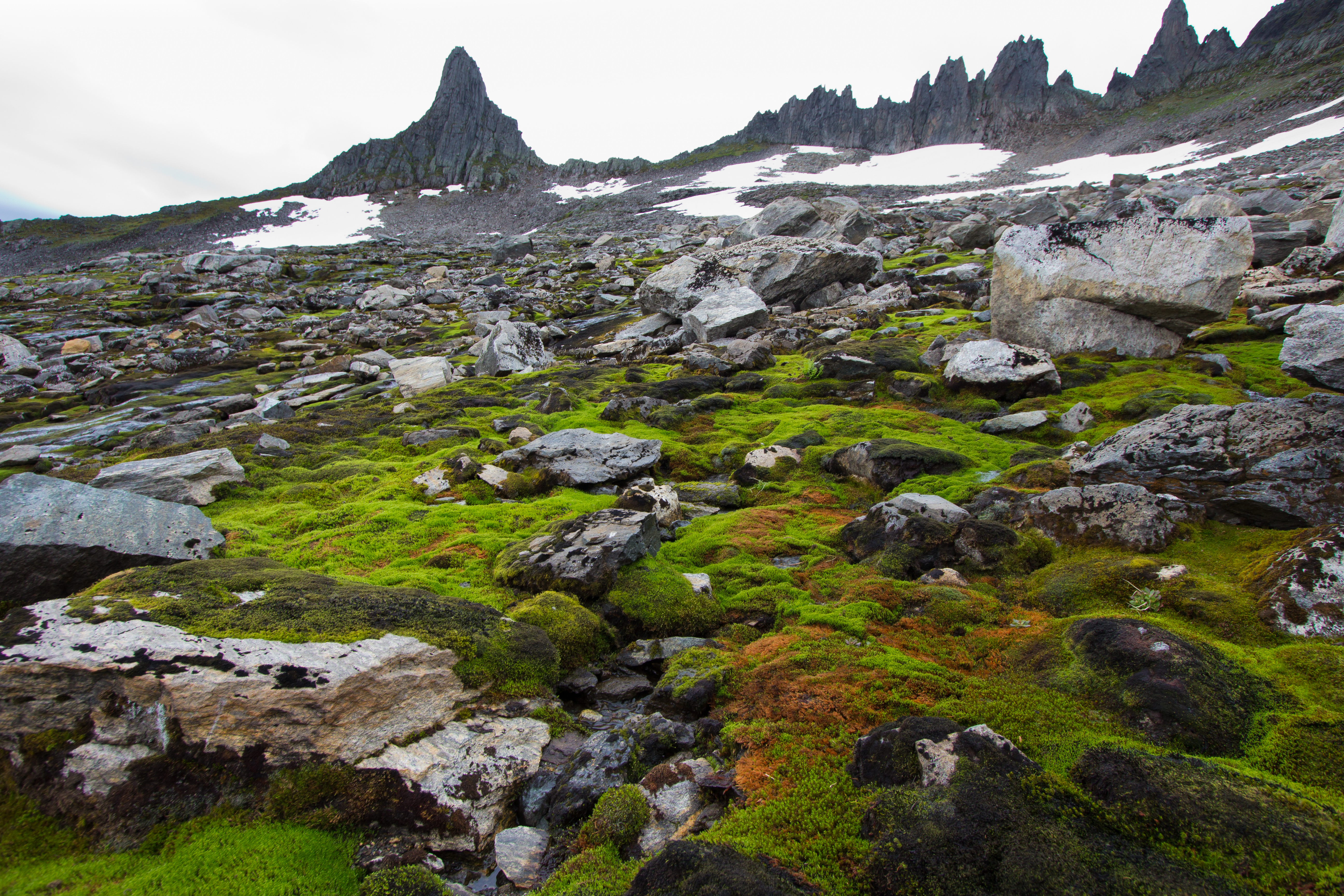 Fingeren 1180 moh. Fjell, fjelltopp i Sunnmørsalpene i Ørsta kommune i Møre og Romsdal, Norge. Turen opp fra Standalseidet. Fjellet ligger rett ved Kolåstinden.